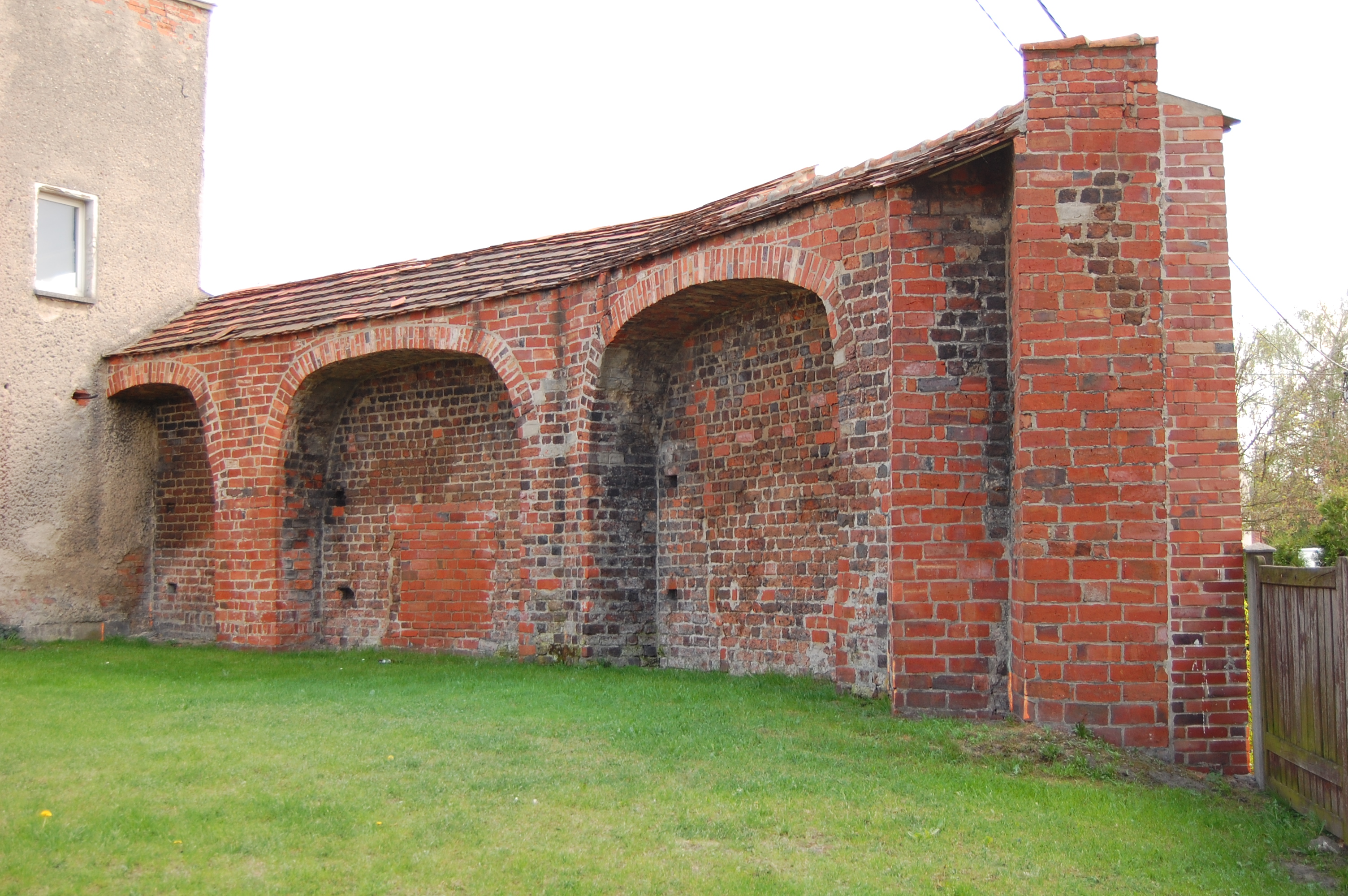 mury miejskie (pozostałości) Olesno, ul. Lompy, Olesno